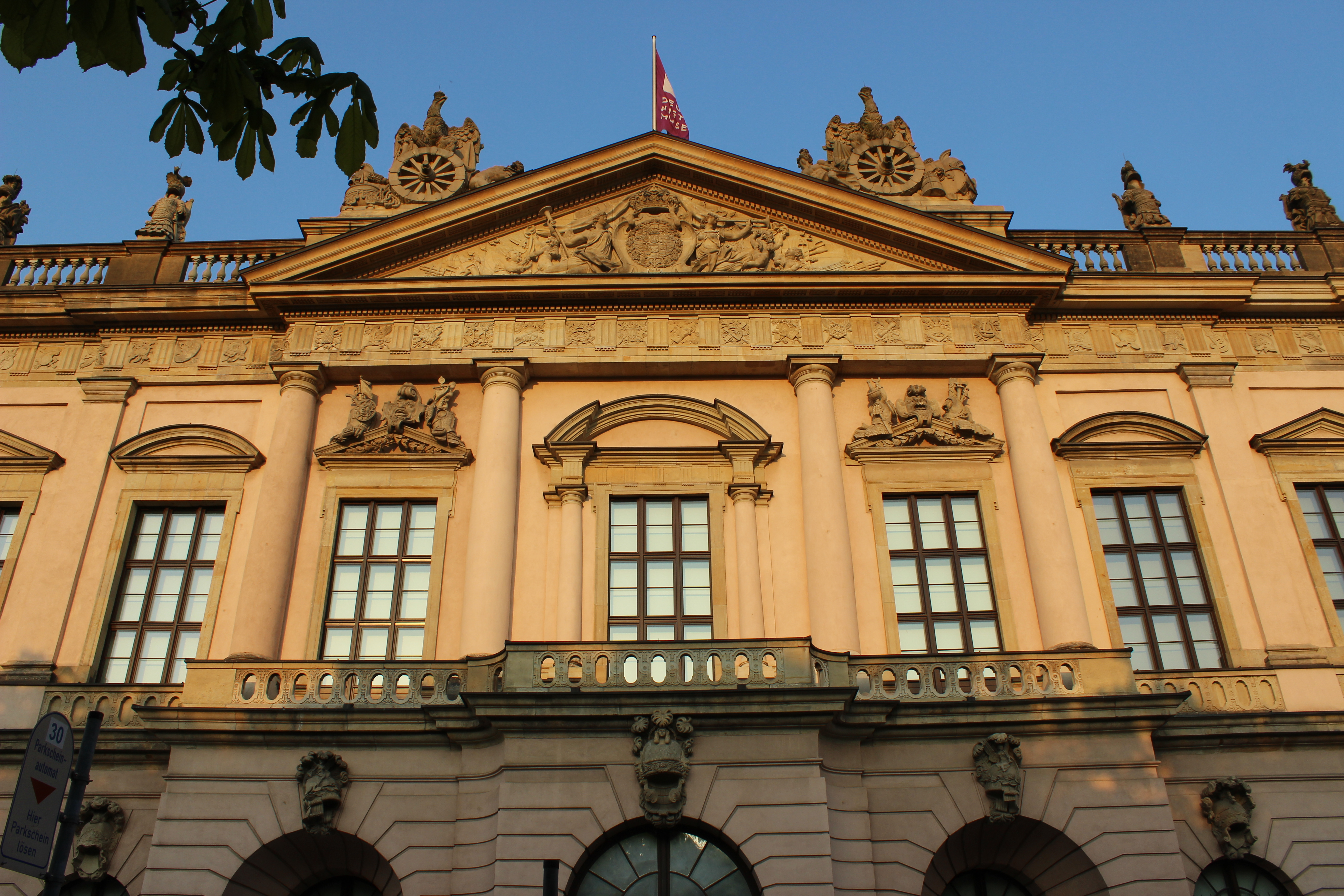 Berlín. Zeughaus, fachada lateral.